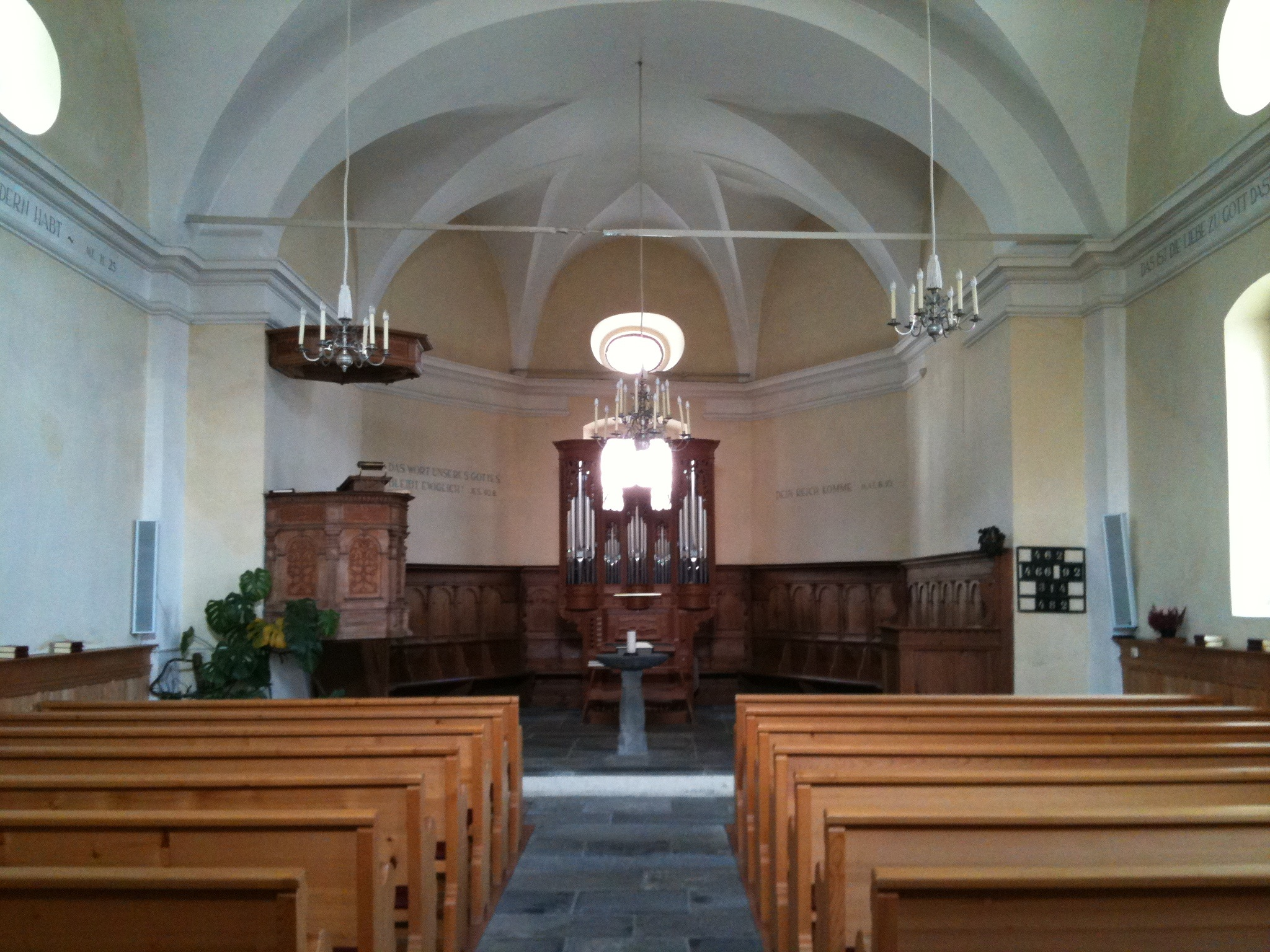 reformierte Kirche Sarn, Kanton Graubünden